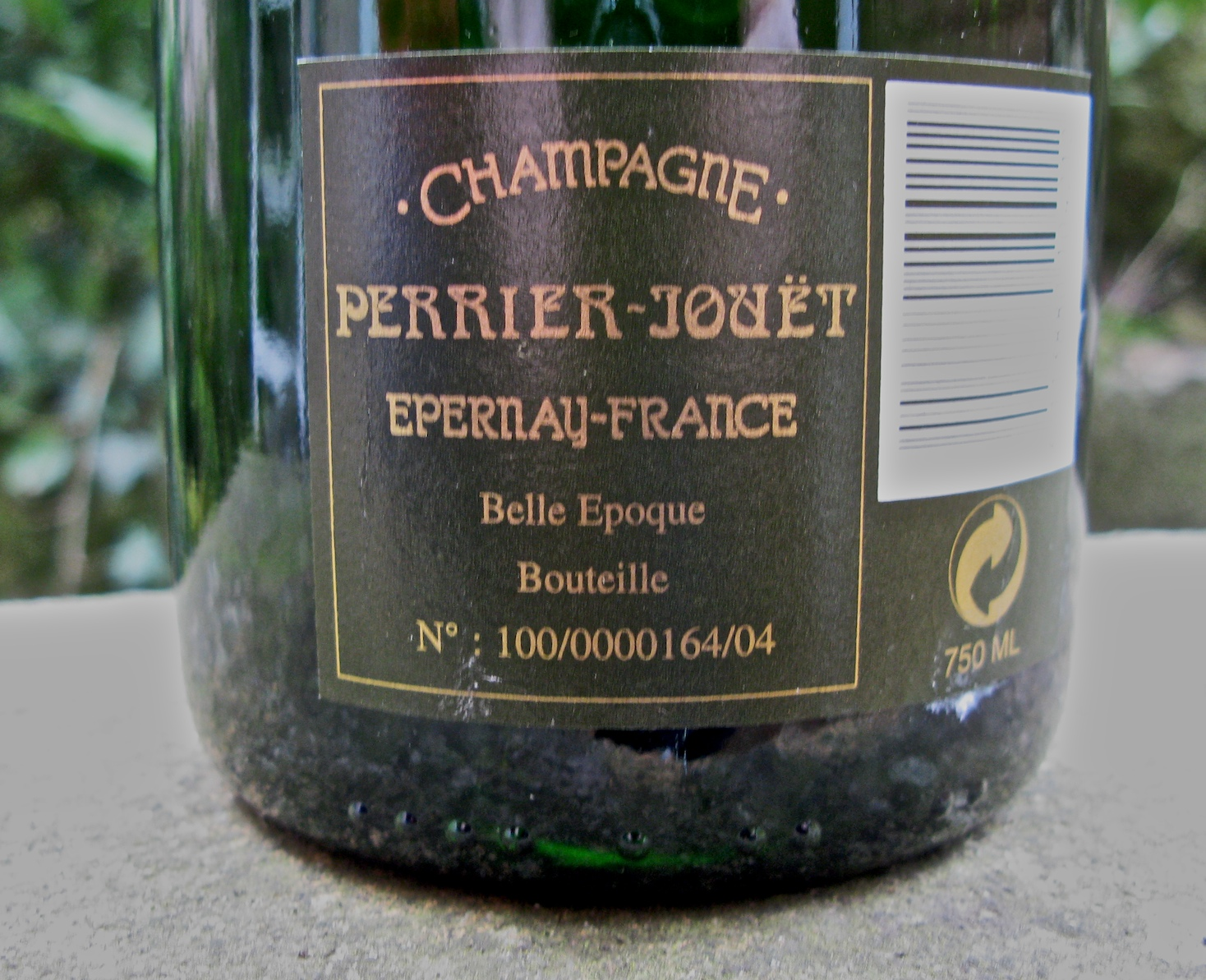 Eng Récketikett op enger Schampesfläsch